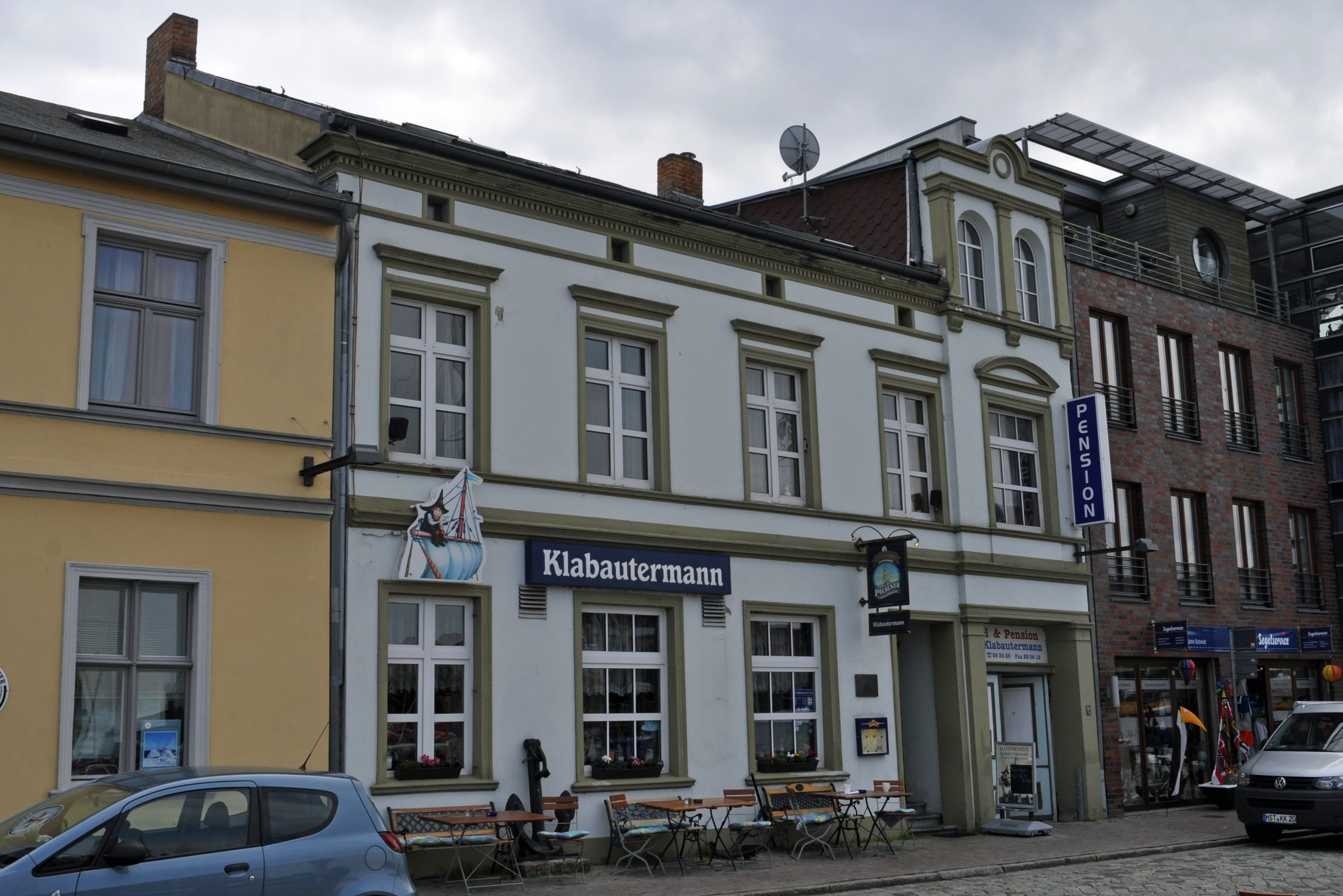 Im Tierpark Stralsund (see Tierpark Stralsund.